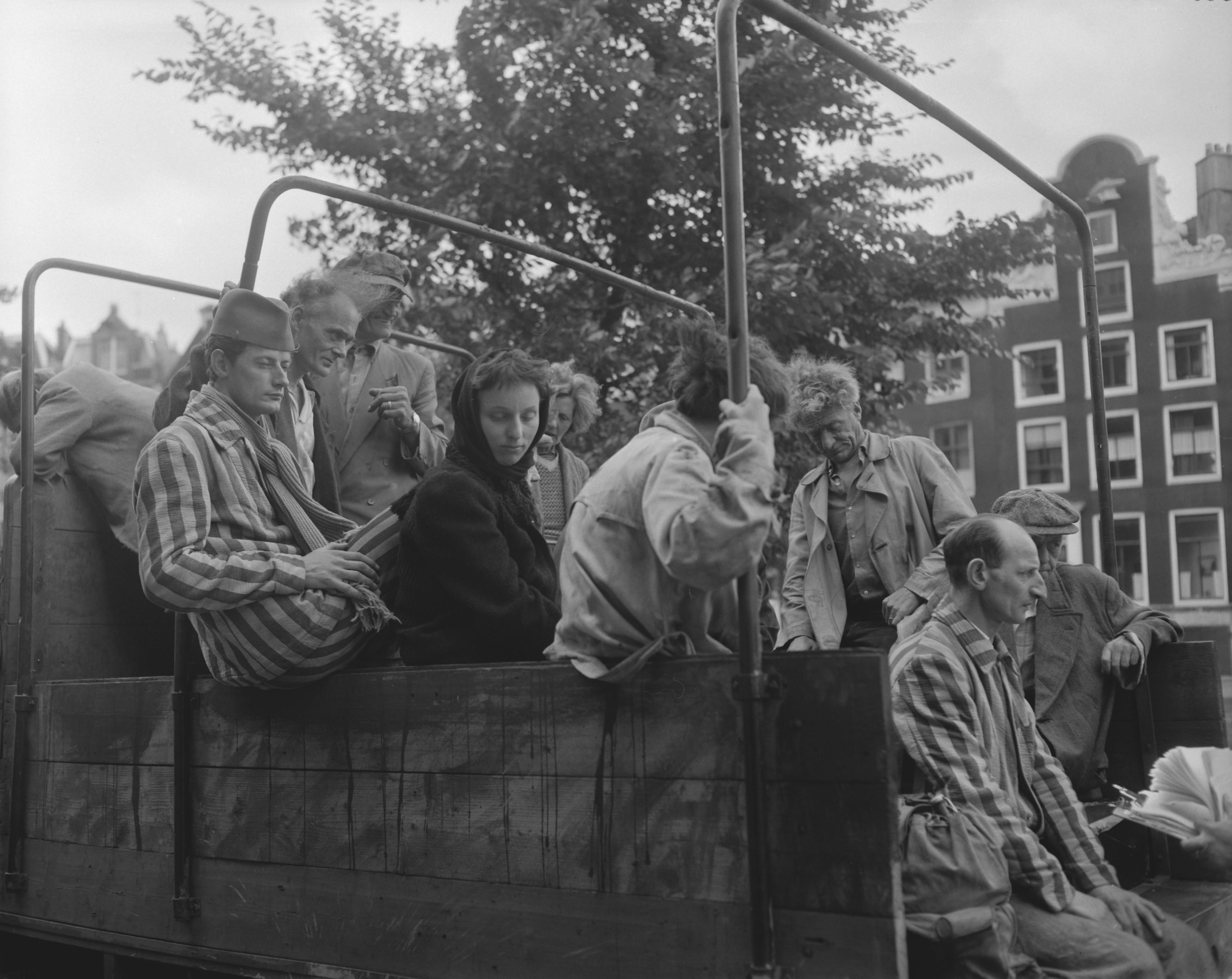 Filmopnamen voor de "Anne Frankfilm" in Amsterdam